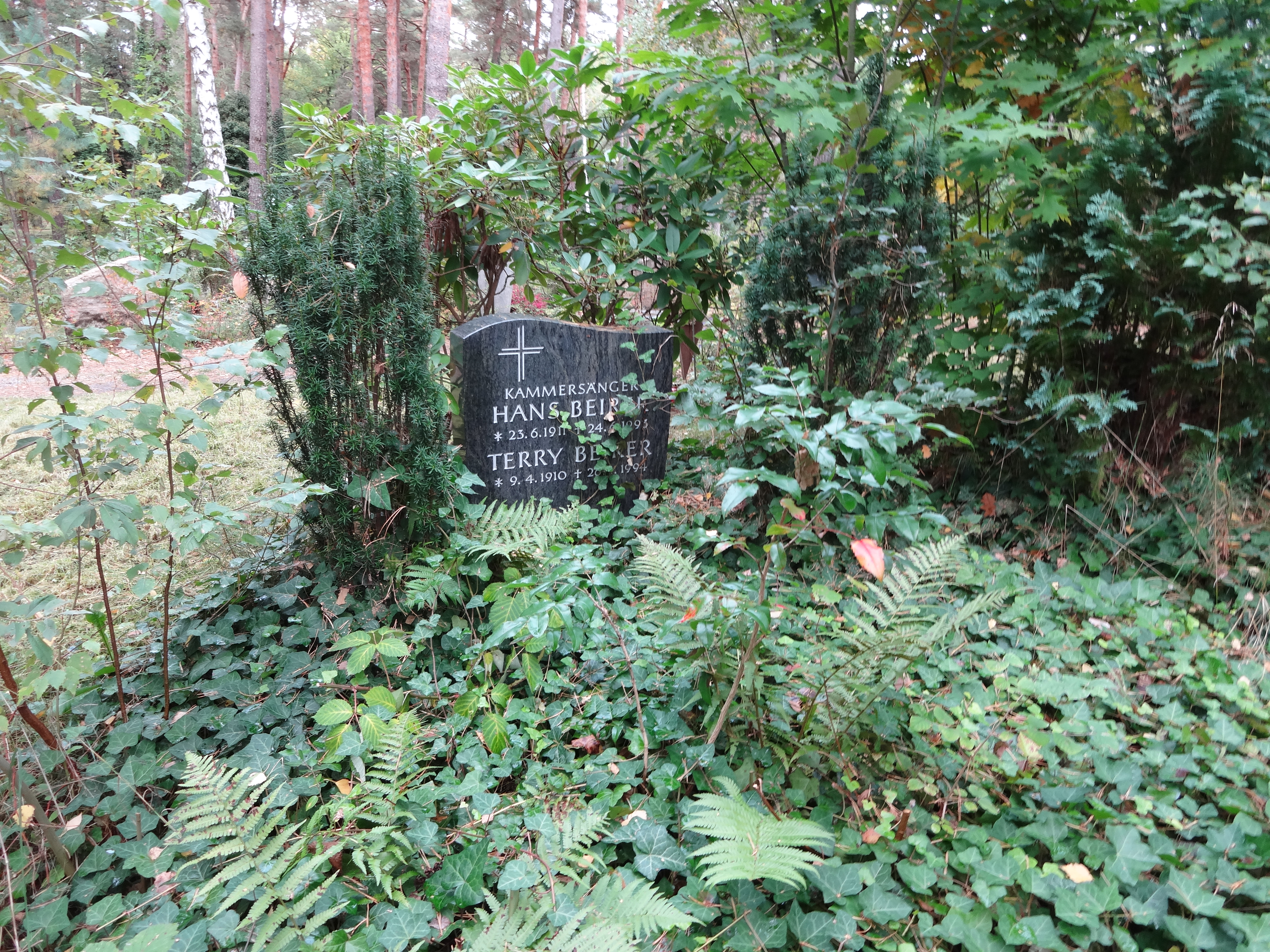 Grab von Kammersänger Hans Beirer auf dem Waldfriedhof Zehlendorf